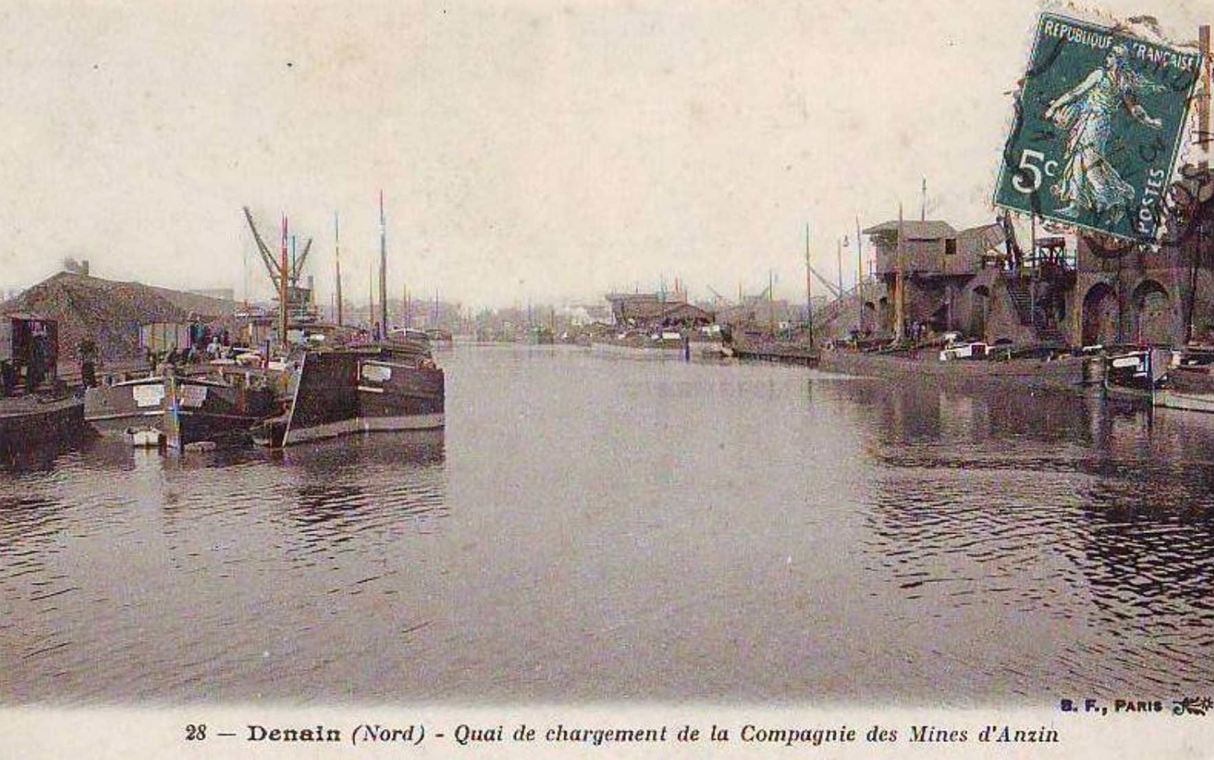 Quai de chargement de la Compagnie des mines d'Anzin, Denain, Nord, Nord-Pas-de-Calais, France.